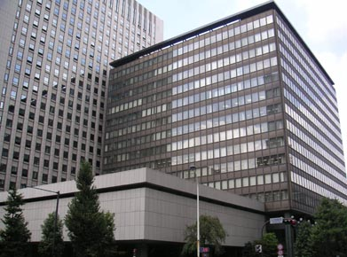 みずほフィナンシャルグループ本部。東京都千代田区大手町。 Headquarters of Mizuho Financial Group (みずほフィナンシャルグループ) in Otemachi, Chiyoda, Tokyo, Japan